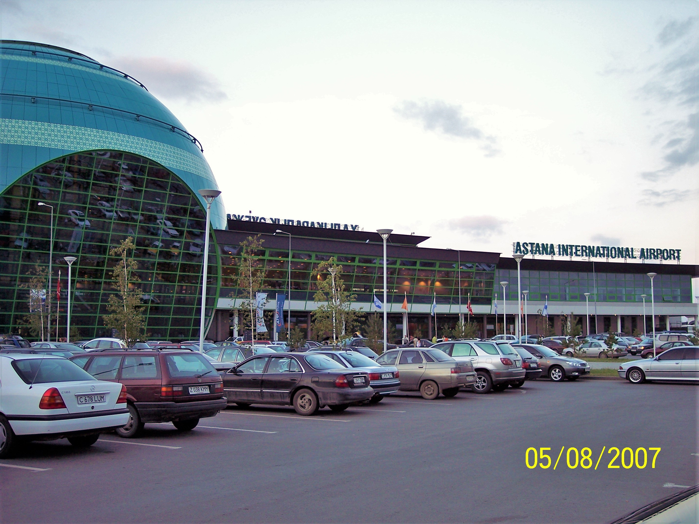 NUR-SULTAN AIRPORT,KAZAKHSTAN